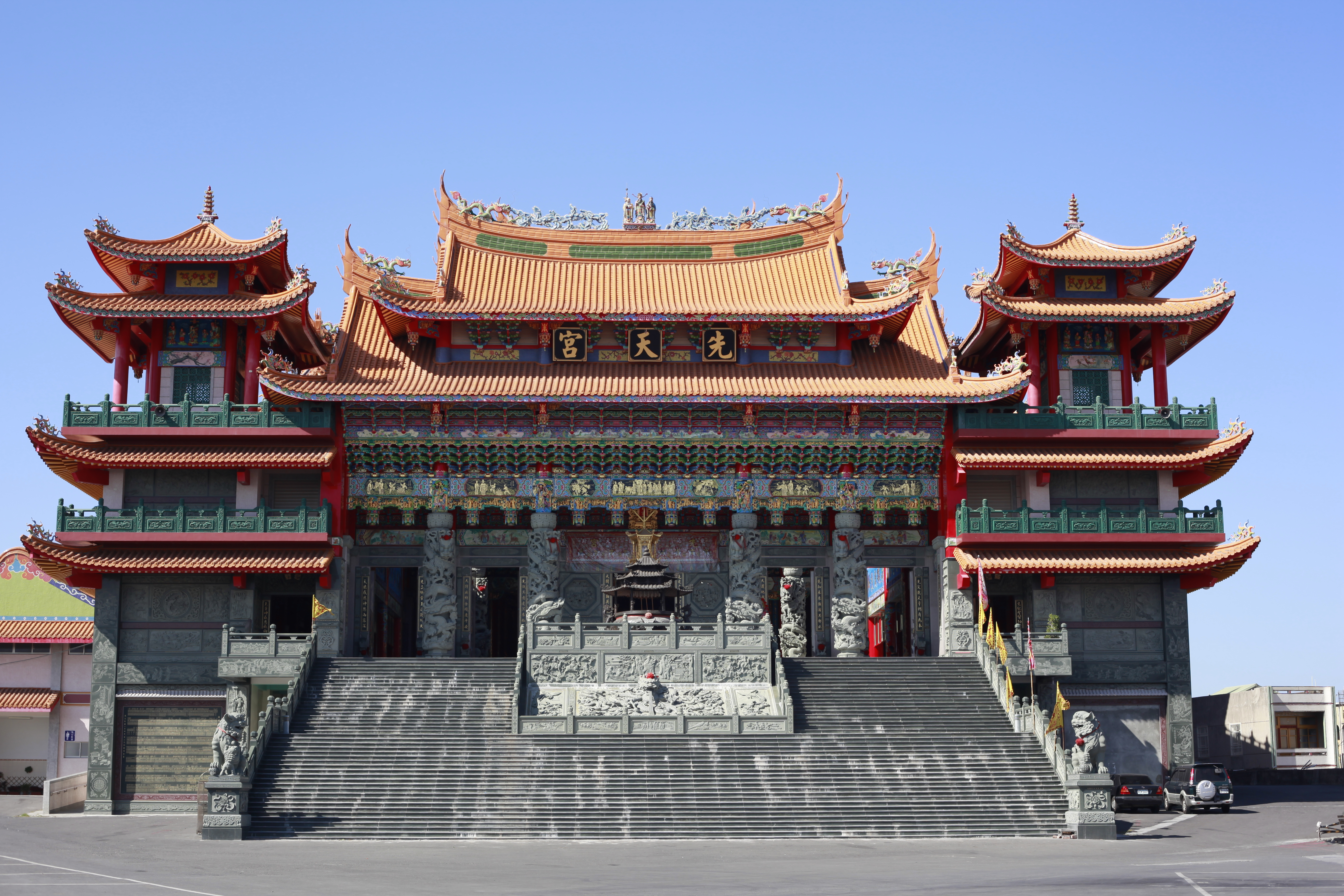 先天宮新廟貌